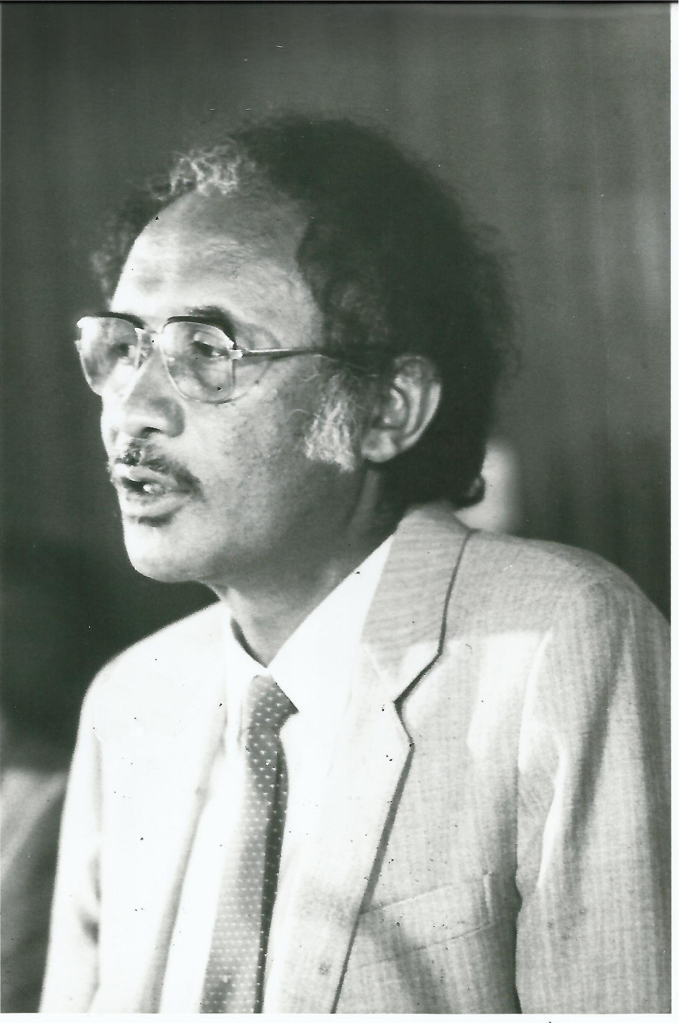 Photo de LXM Andrianarahinjaka